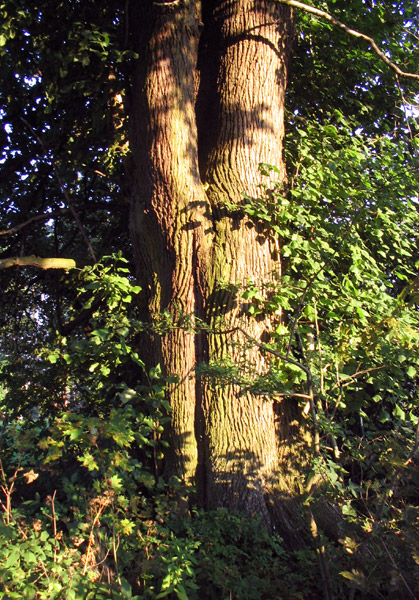 Strašice, okres Rokycany, kmen Farské lípy schovaný v křoví.